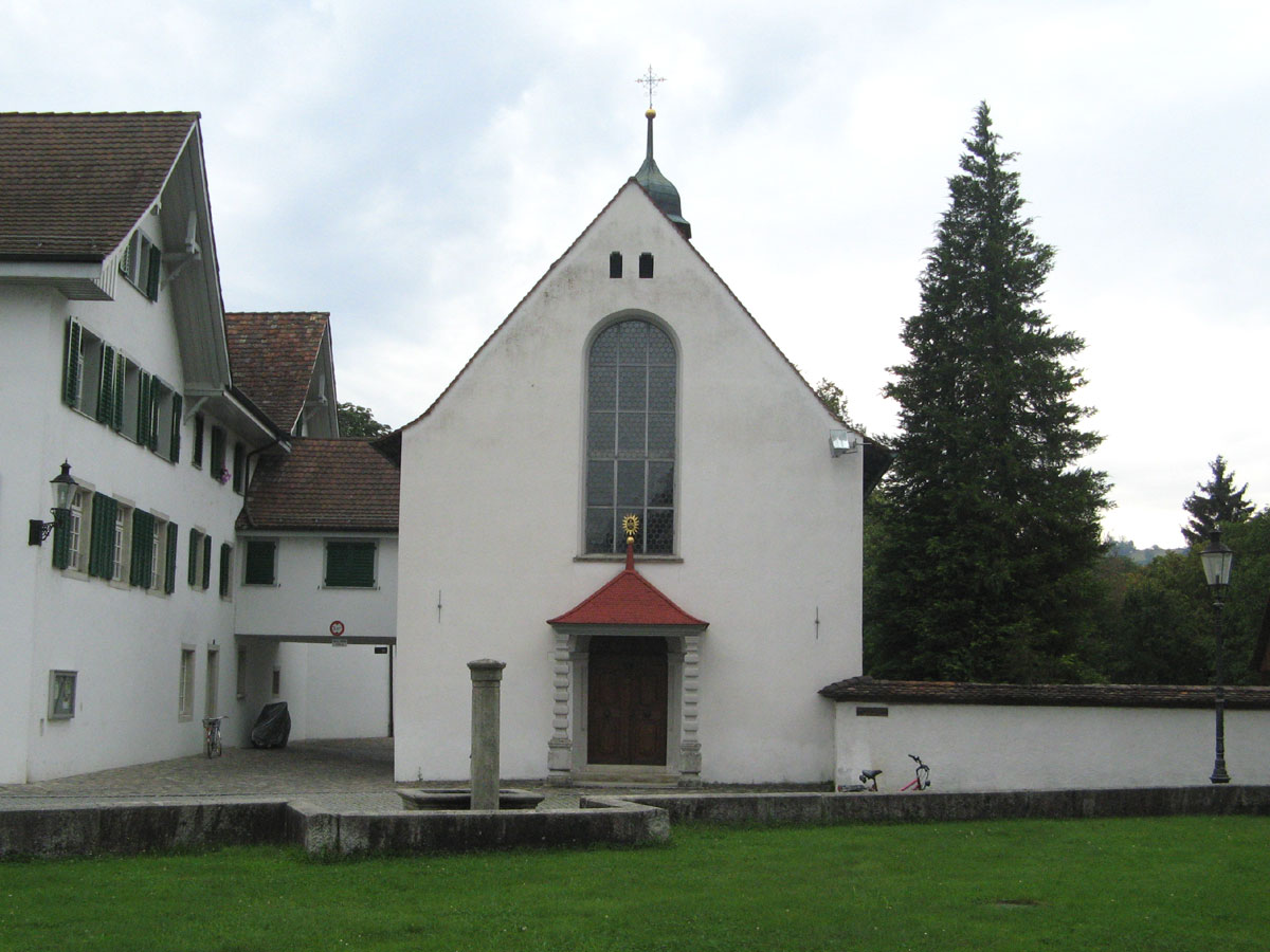 Klarakapelle neben der Stadtkirche Bremgarten